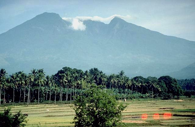 Mount Banahao (Banahaw), Philippines